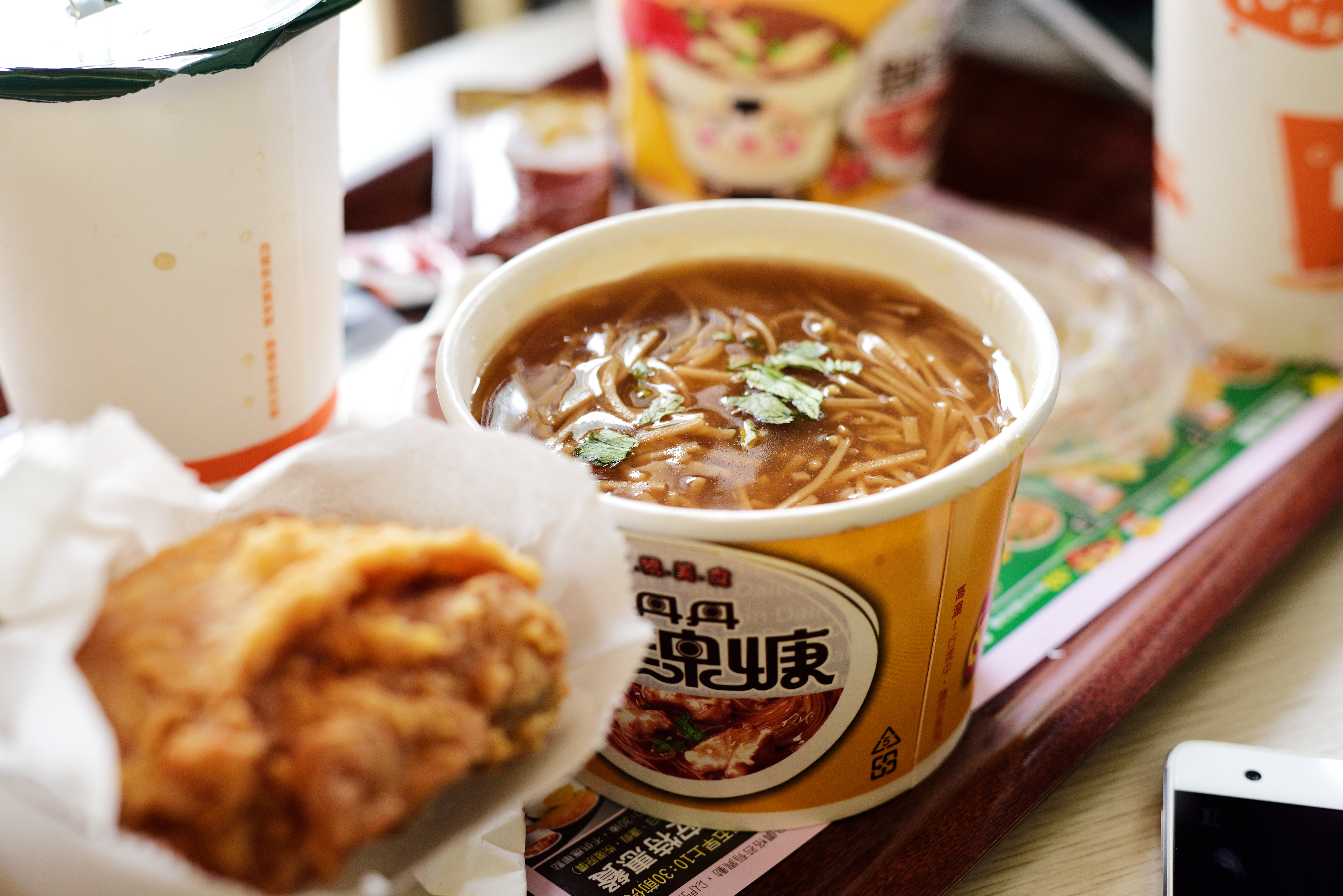 丹丹漢堡販售的丹丹麵線焿，麵線是甜的。